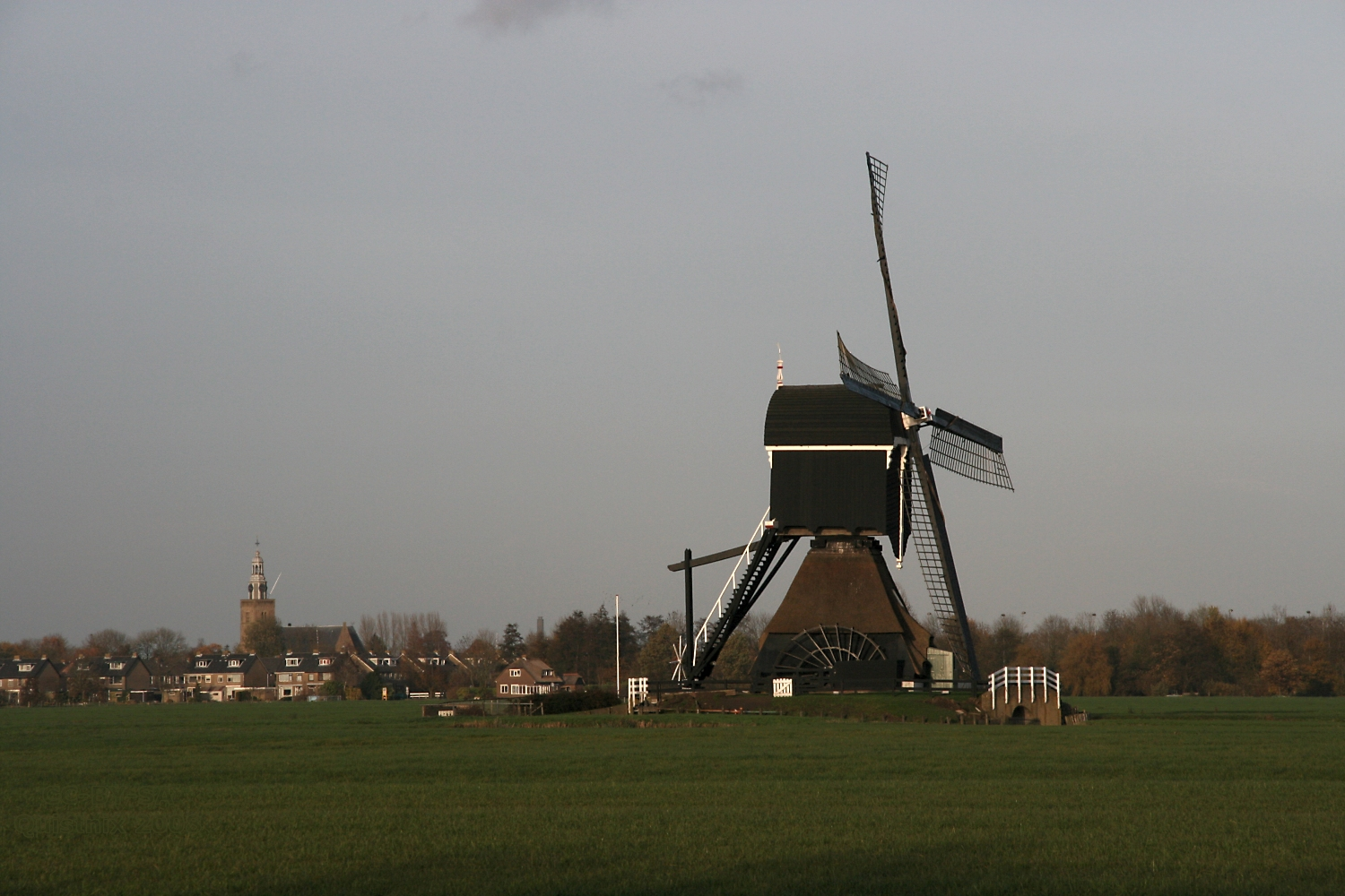 Streefkerk: Oude Weteringmolen